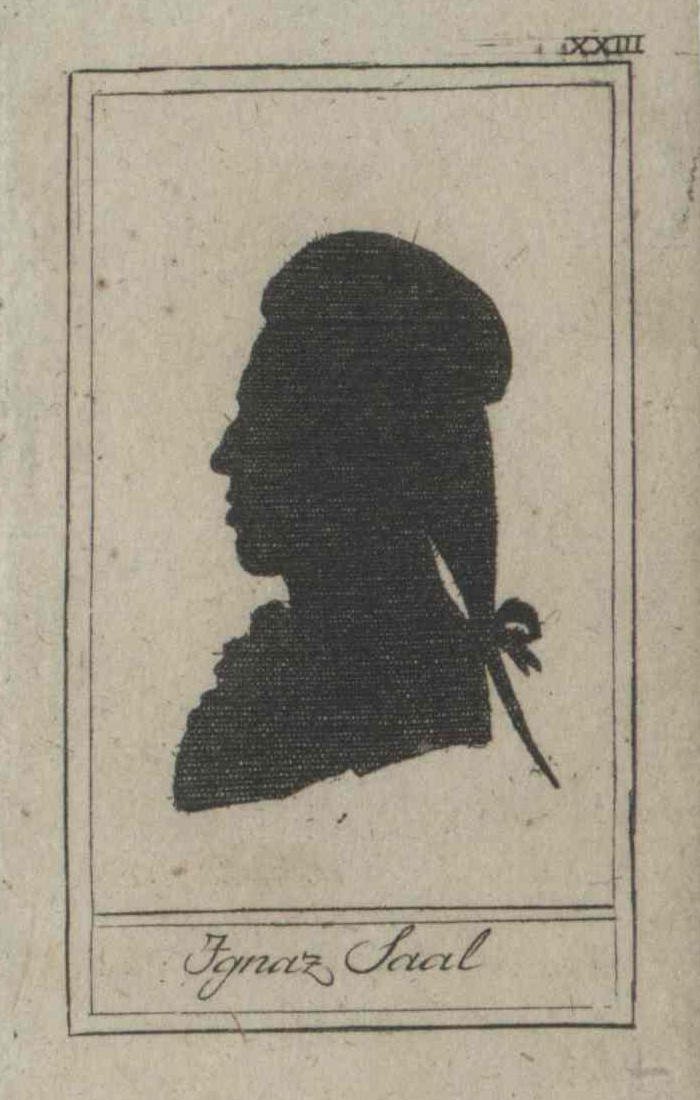 Depicted person: Ignaz Saal